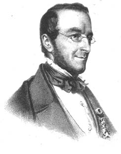 André Dumont (1809-1857), Belgian geologist